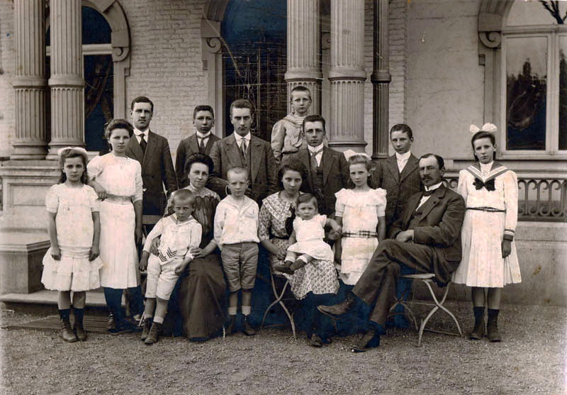 Groepsportret van de familie Regout-Stevens in Maastricht. Gustave Joseph Hubert Marie Eugene Regout (1869-1920), kleinzoon van Petrus Regout en eveneens ondernemer, trouwde in 1890 met Bertha Melanie Josephine Stevens (1870-1959) en kreeg met haar vijftien kinderen: Philippe, Melanie, Maurice, Wies, Max, Marth, Gustaaf, Jenny, Jetty, Gus, Clement, Armand, Felix, Lucien, Jan en Niny. Fotocollectie RHCL Maastricht, GAM 18392.